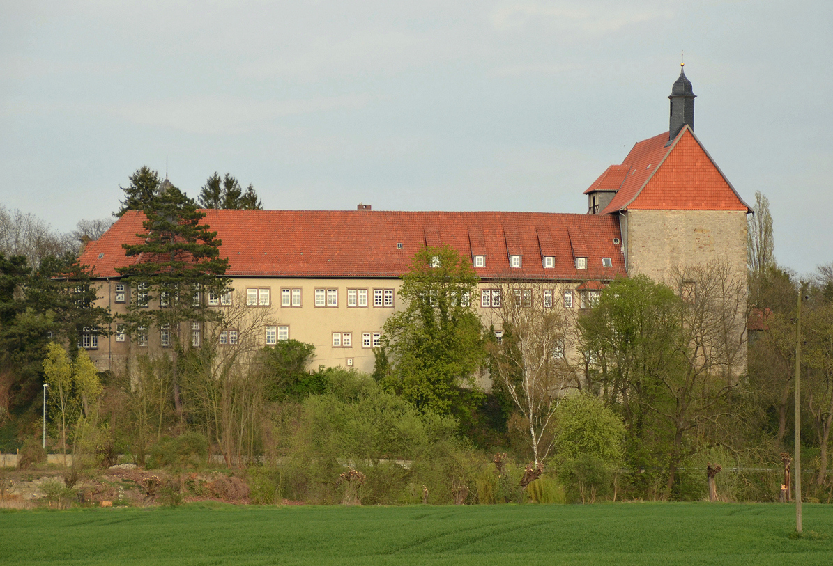 Poppenburg